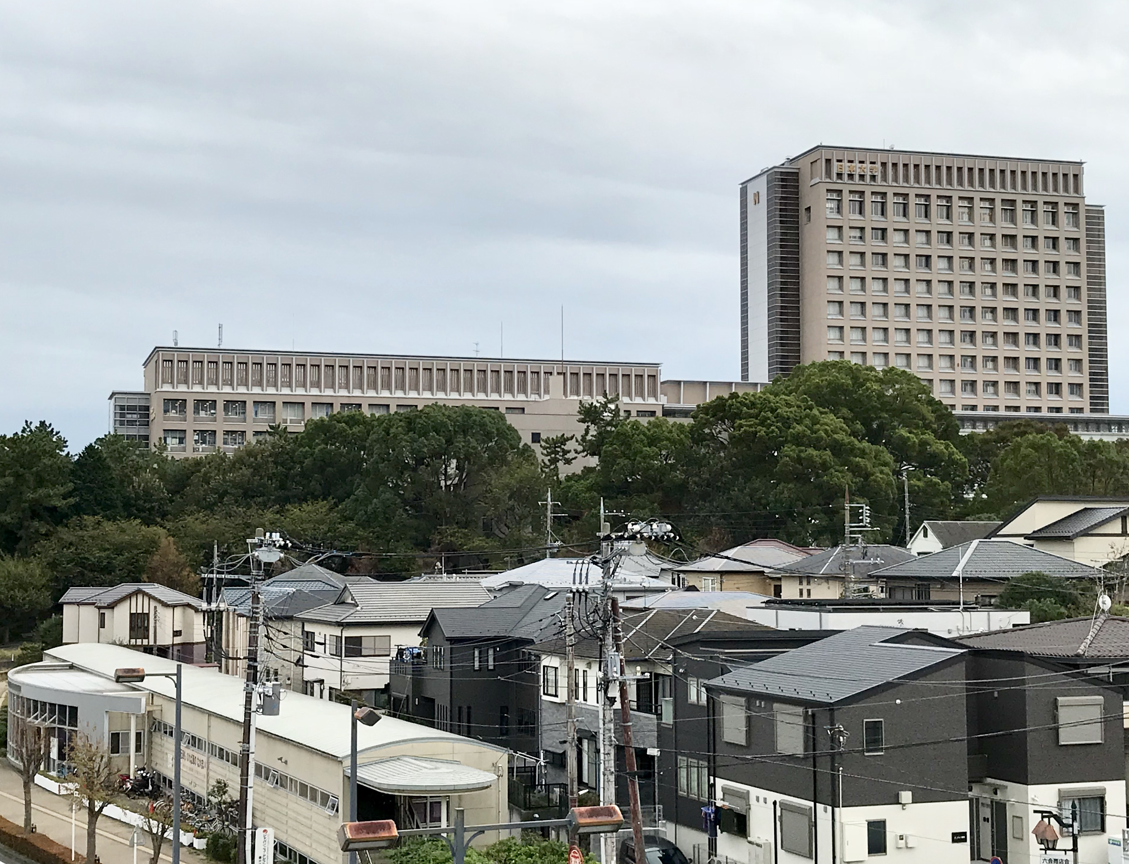 小田急江ノ島線六会日大前駅から見た日本大学湘南校舎